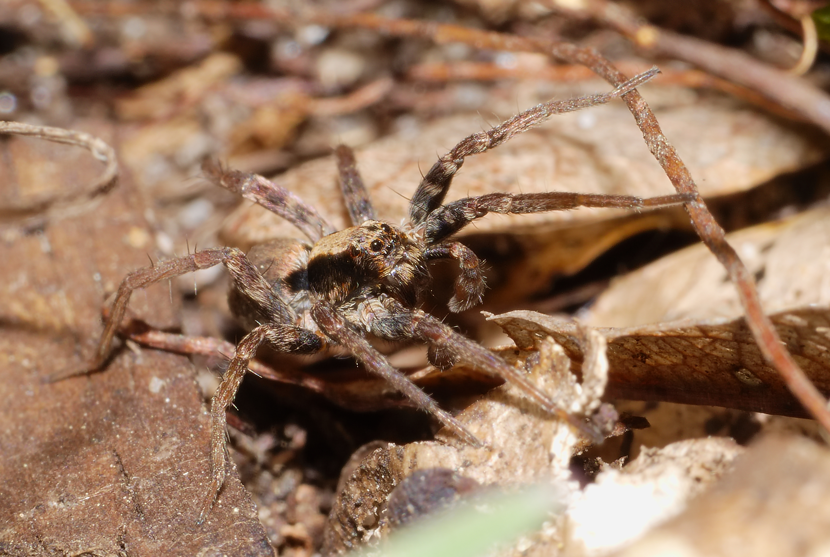 Wolfspinne - Xerolycosa nemoralis, Männchen. Aufgenommen in Mannheim im Käfertaler Wald, Baden-Württemberg, Deutschland.